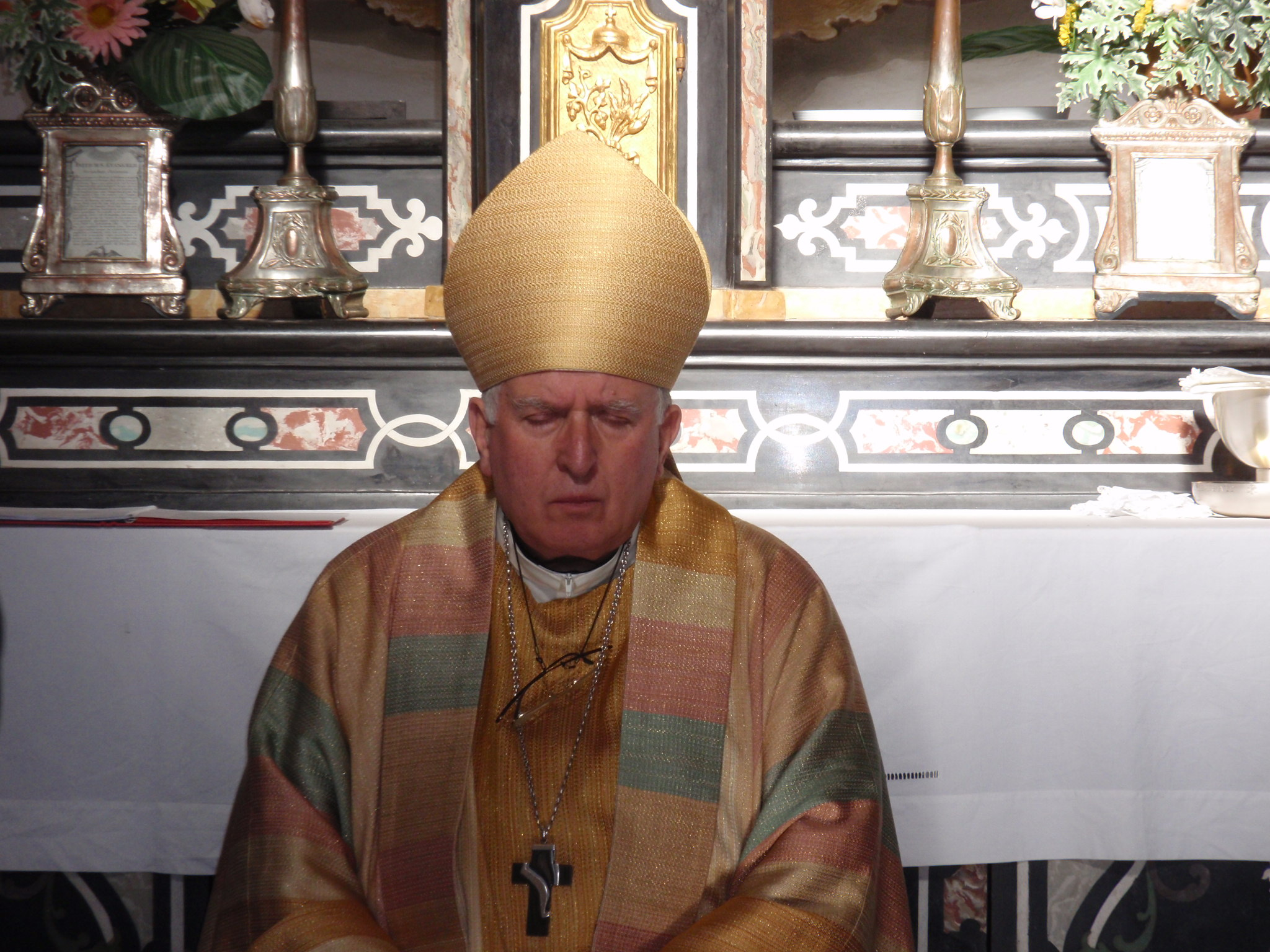 Monsignor Pier Giacomo Grampa durante la celebrazione della festività di San Giuseppe a Vezia (Lugano), il 19 marzo 2009